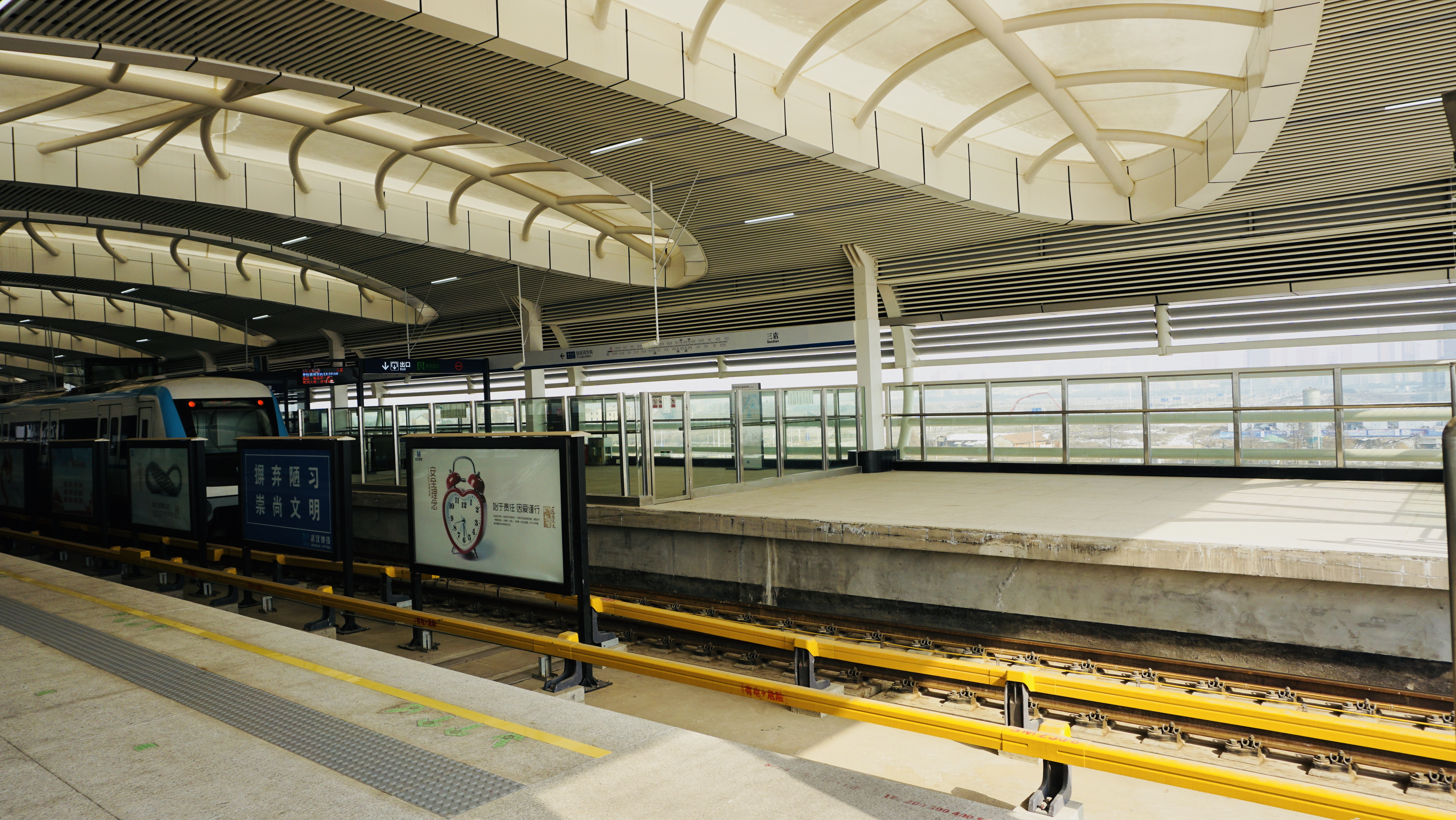 武汉地铁三店站